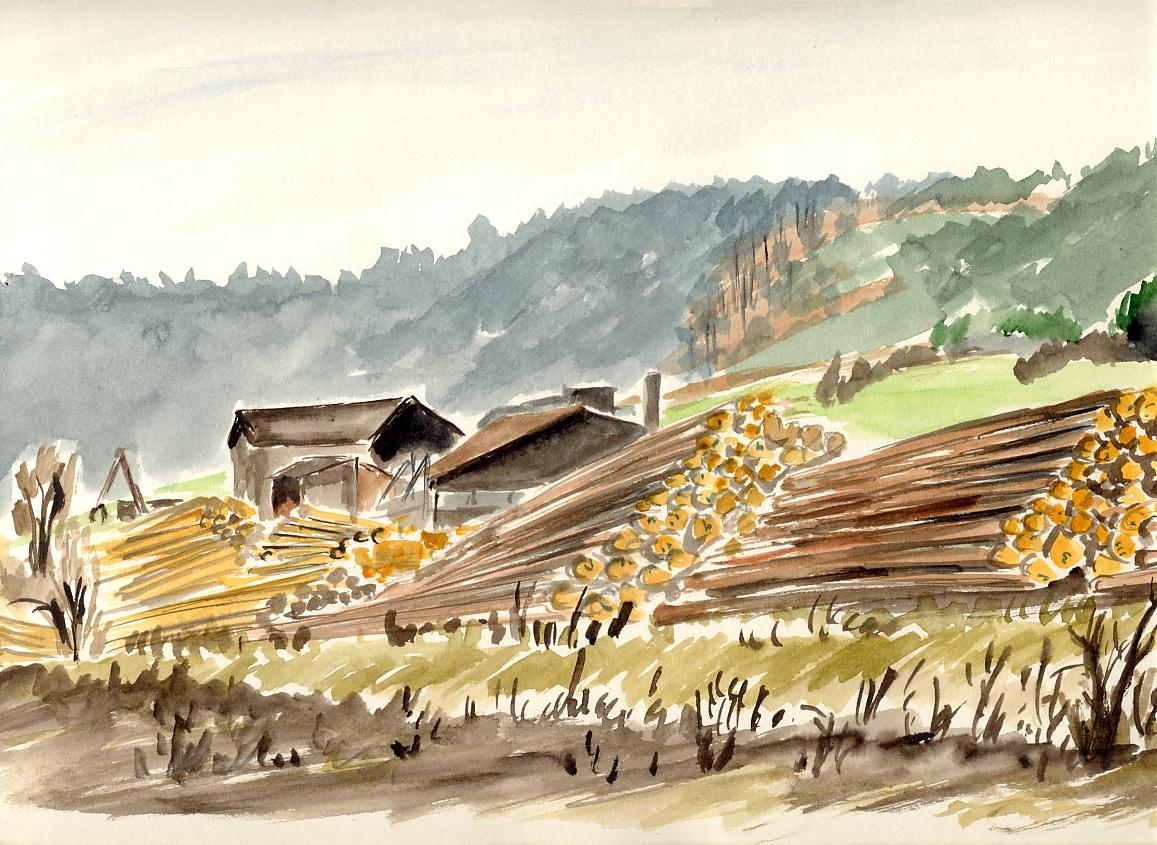 Ablaßmühle Gemeinde Titting im Landkreis Eichstätt3.jpg